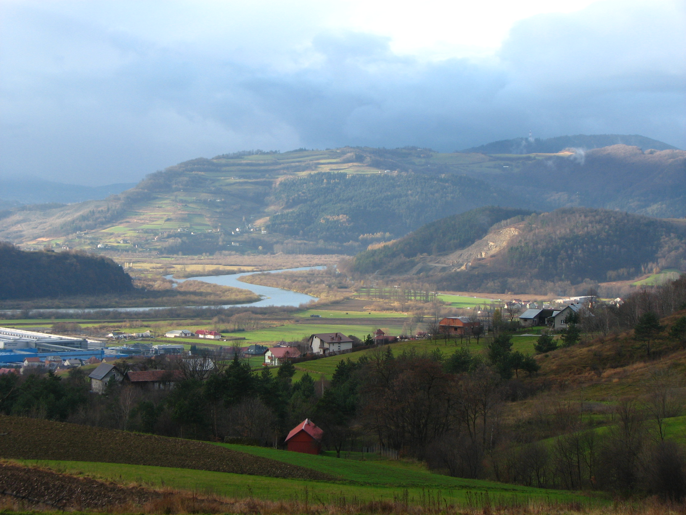 Przełom rzeki Dunajec między masywami: Białowodzkiej Góry (na wprost) i Kurowskiej Góry (niższa-po prawej). Widok znad wsi Wielogłowy.